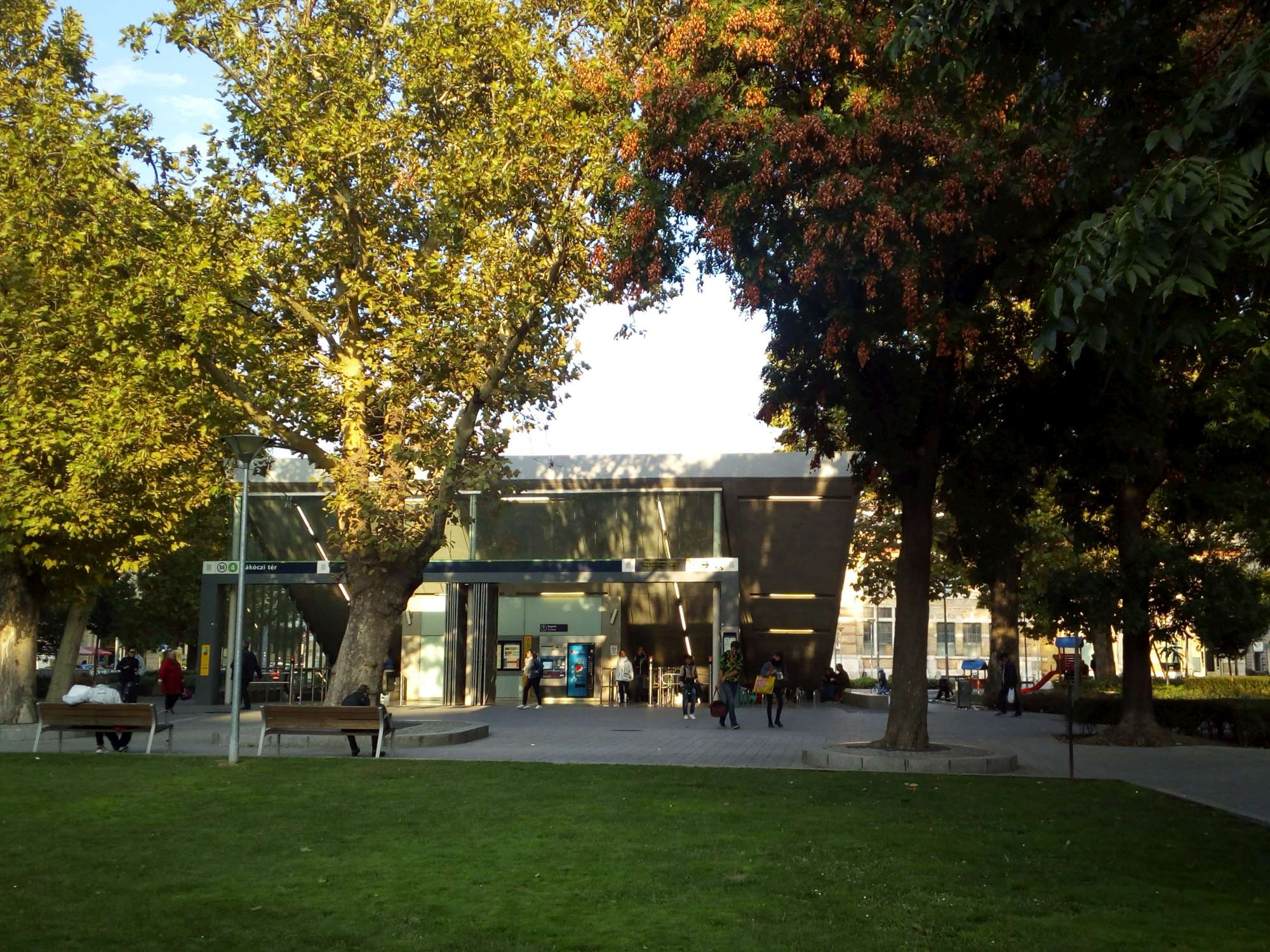 Budapest 4-es metró Rákóczi téri megálló, külső kinézet